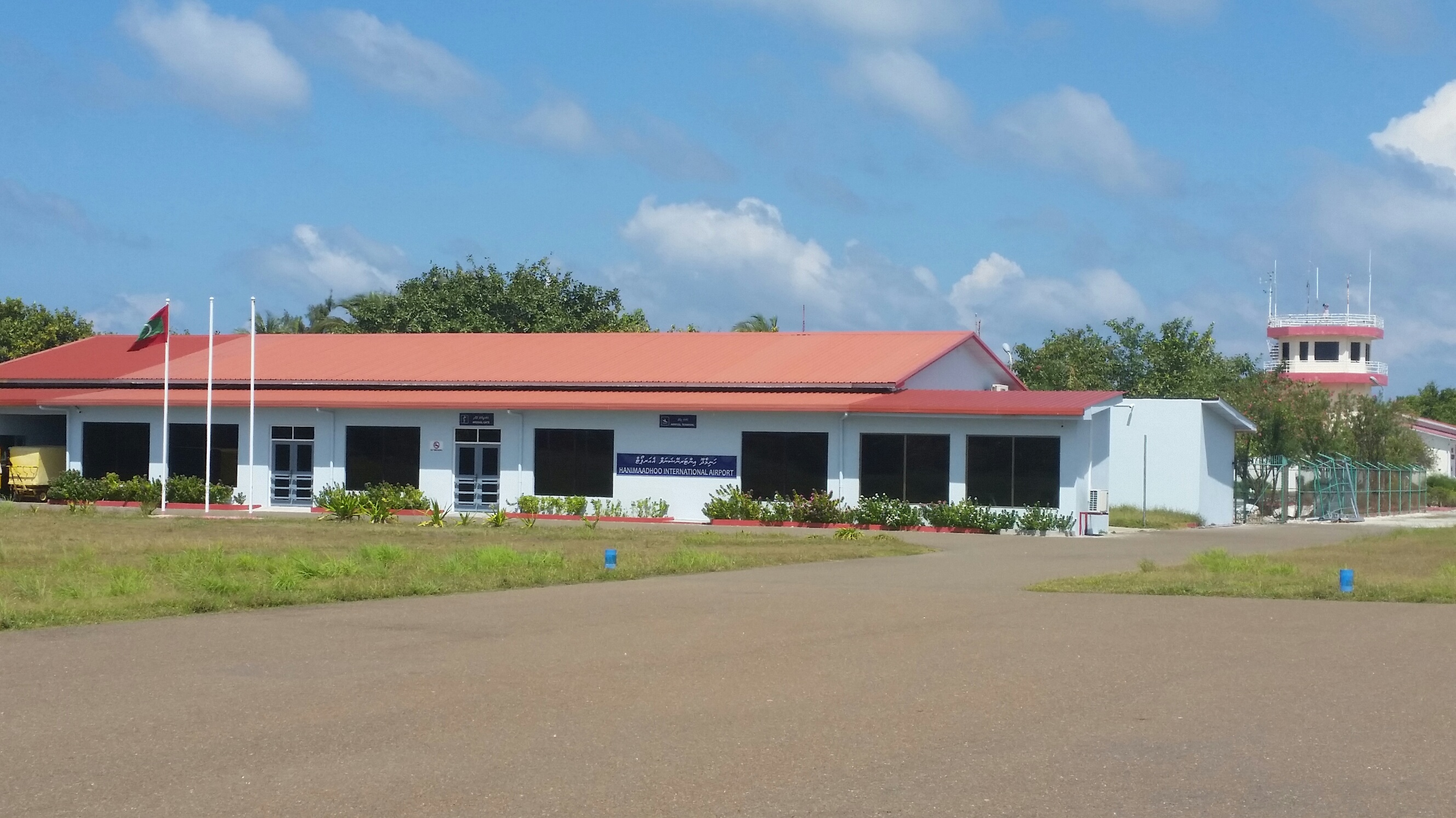 Der Flughafen auf der Insel Hanimaadhoo, Malediven